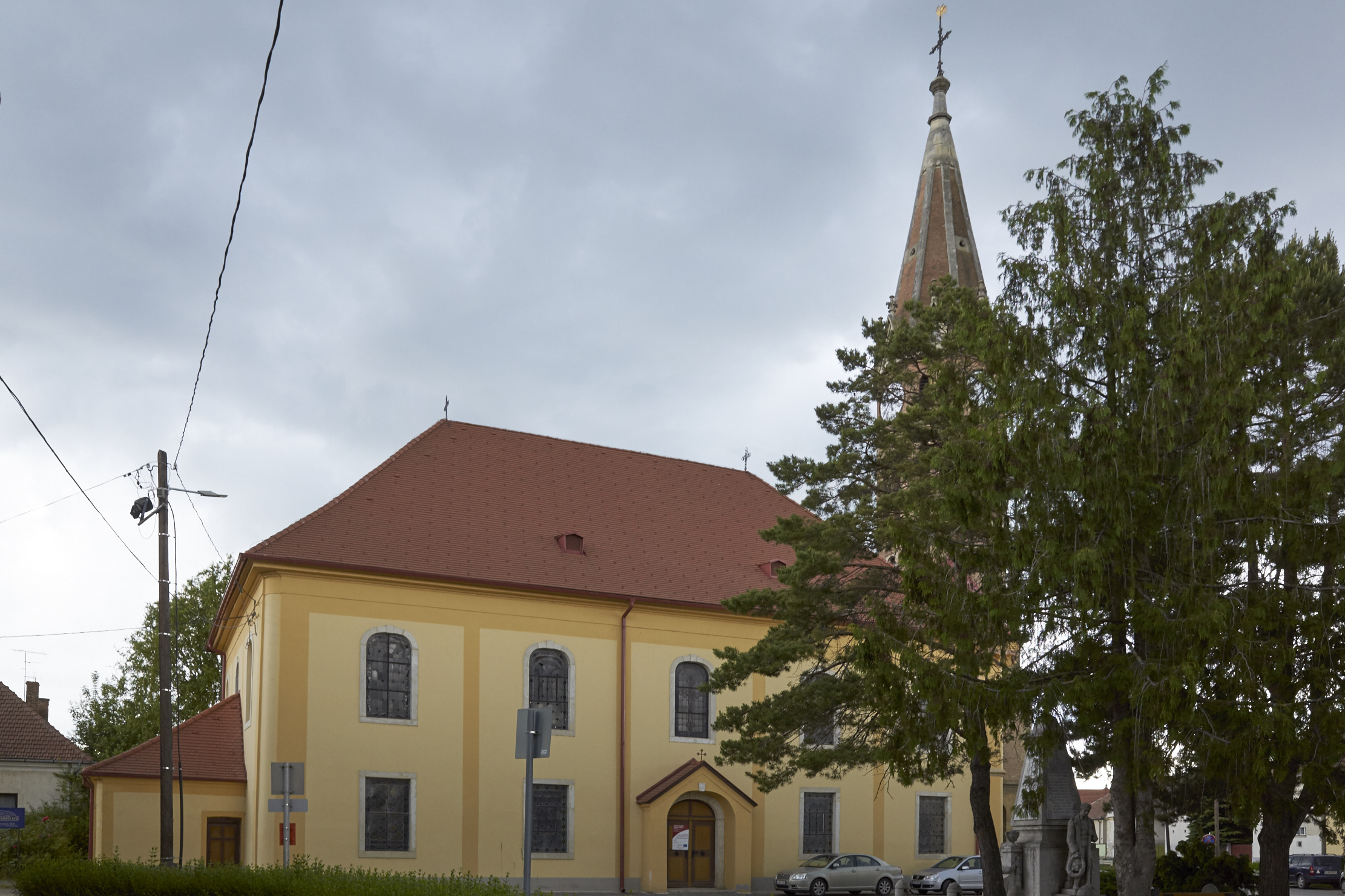 Gesamtansicht der lutherischen Kirche von Ágfalva